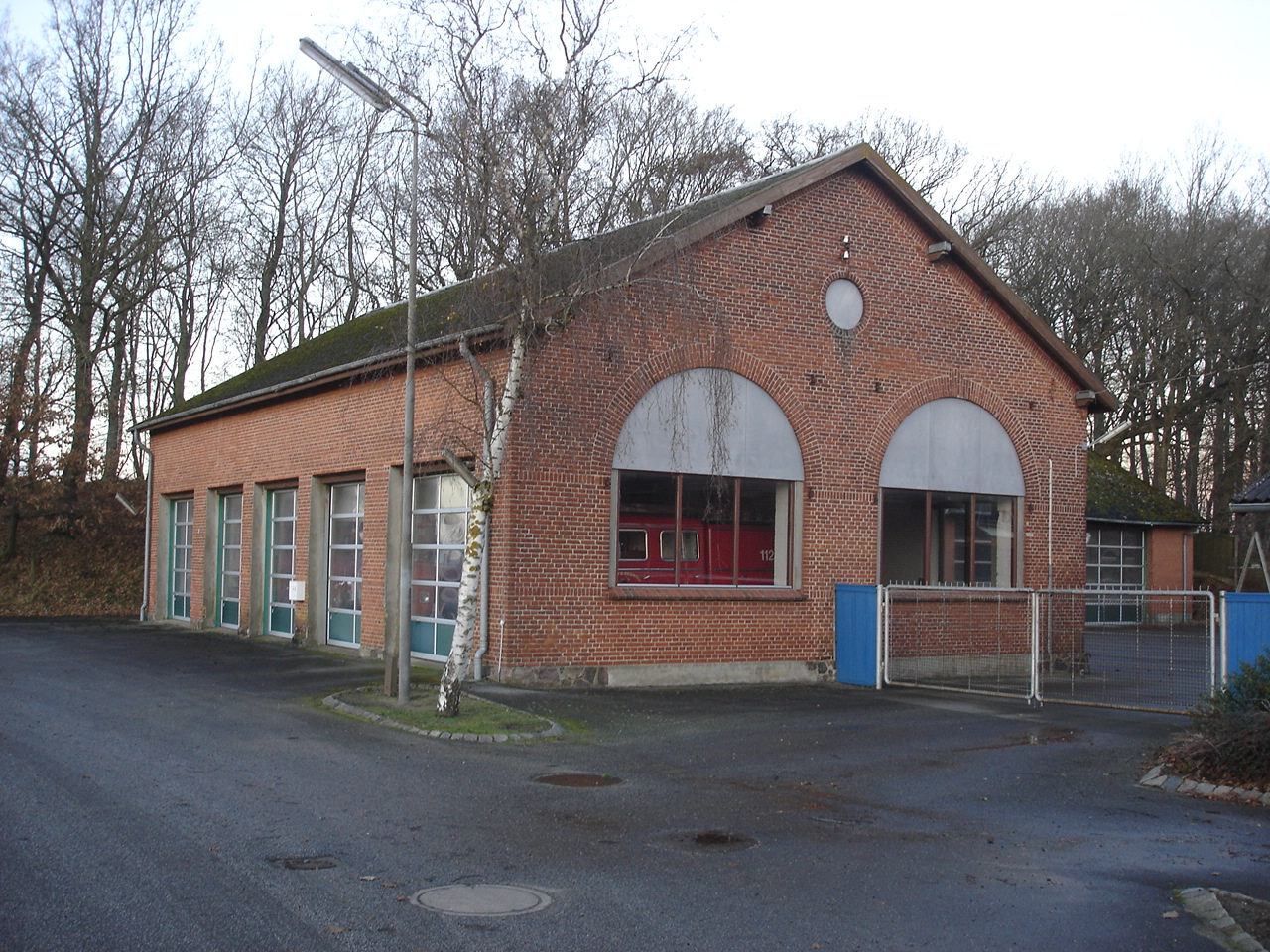 Kjellerup Stations remise